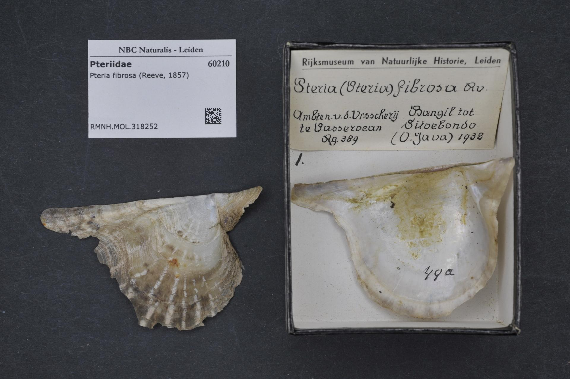 Pteria fibrosa (Reeve, 1857)